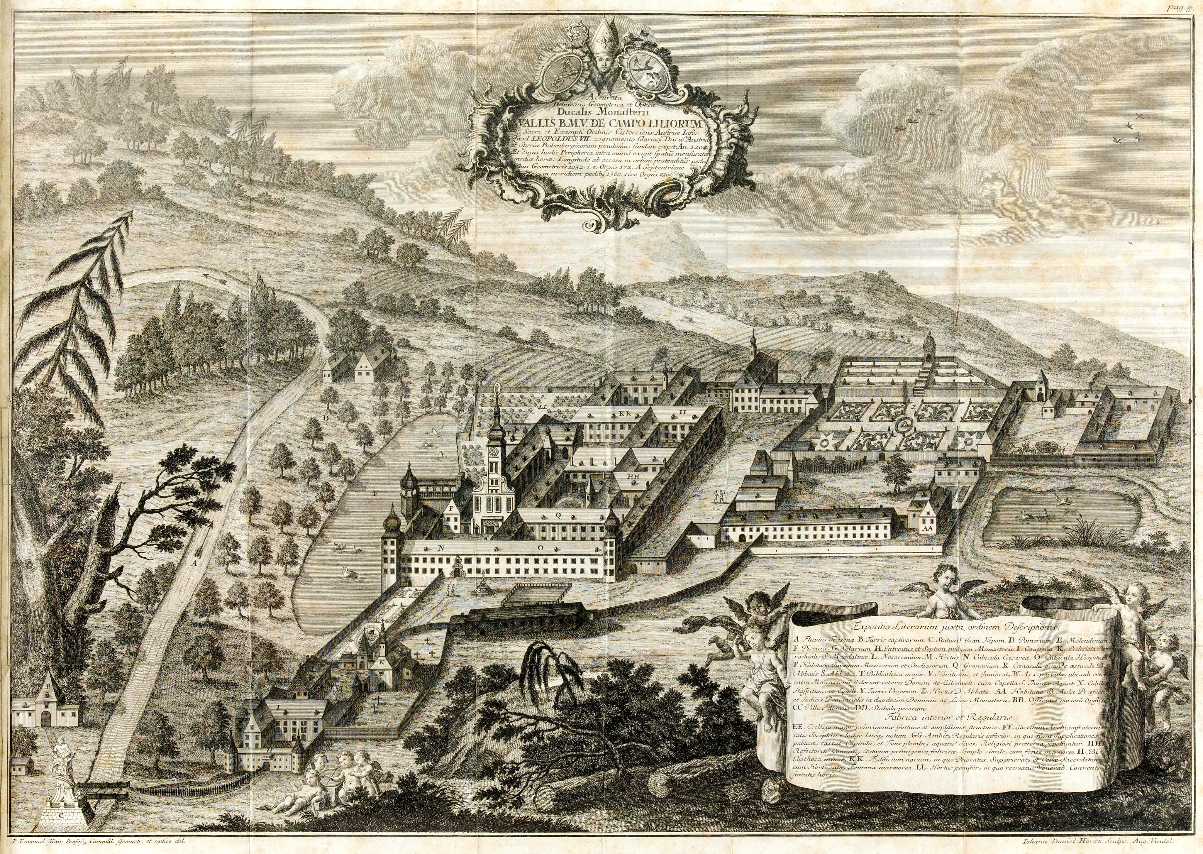 Johann Daniel Hertz nach P. Emanuel Mair. Ansicht des Zisterzienserstiftes Lilienfeld, Niederösterreich, betitelt: "Accurata Delineatio... Monasterii Vallis B. M. V. de Campo Liliorum ...", Kupferstich, Augsburg 1747, signiert: "Johann Daniel Hertz... - P. Emanuel Mair ...", aufgefaltet, da aus Buch, Chrysostomus Hanthaler, Fasti Campililienses, Linz 1747, bezeichnet: "pag. 5", ca. 47 x 68 cm, stockfleckig, verglast, älterer Waschgoldrahmen (Ko) Ruf 500